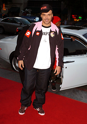 El fotógrafo estadounidense David LaChapelle a la entrada del Teatro Egipcio en Hollywood, California, para el estreno de su película Rize. 21 de junio de 2005.